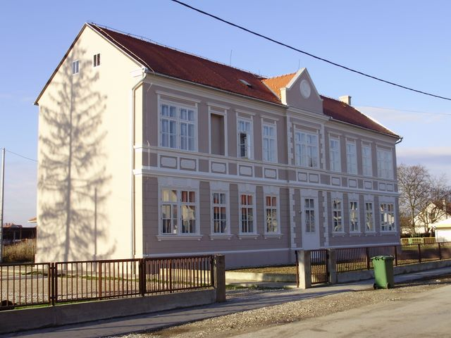 Škola je izgrađena 1900.g.od graditelja Nikole Hribara. Obnovljena je 2008.g.